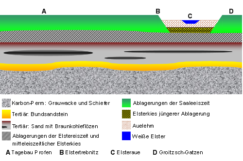 Geologie der Auelandschaft um Elstertrebnitz, sowie des Tagebau Profen